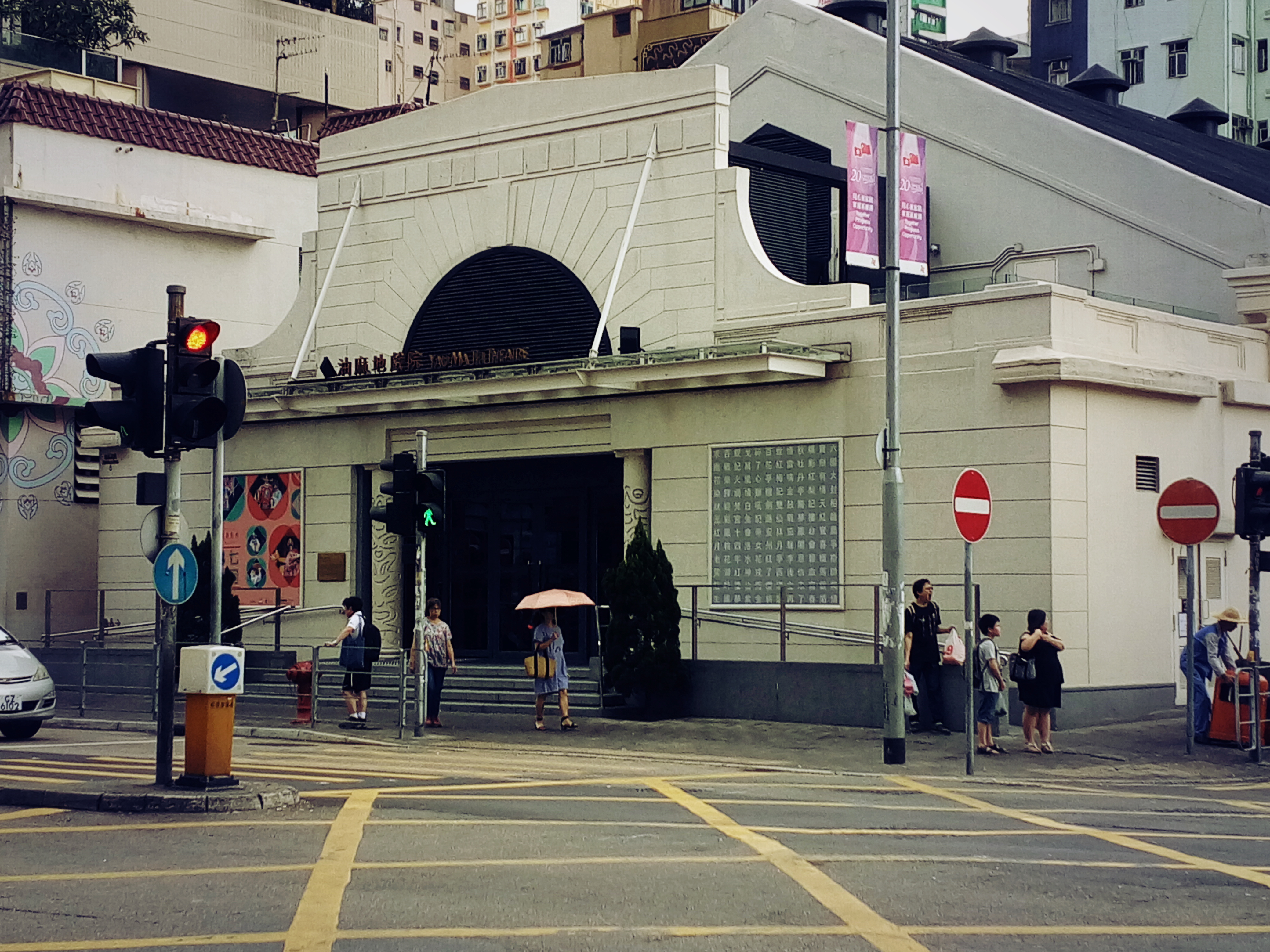 油麻地戲院